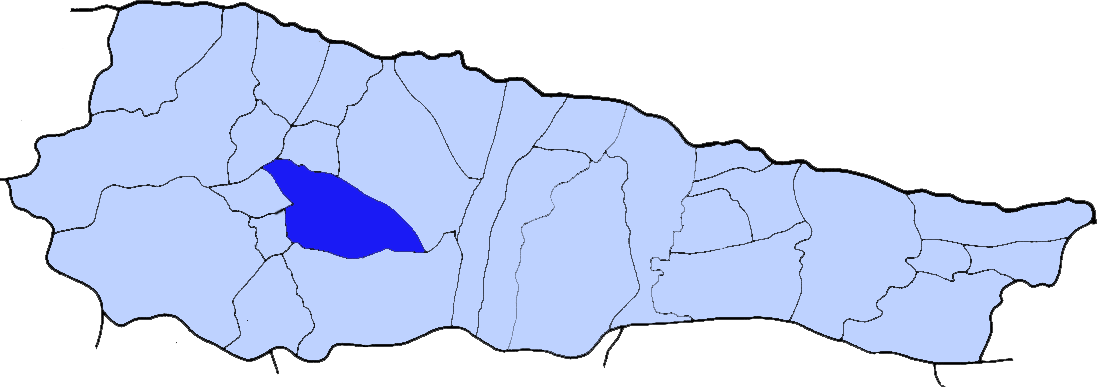 Localización de Vibaño en el concejo de Llanes